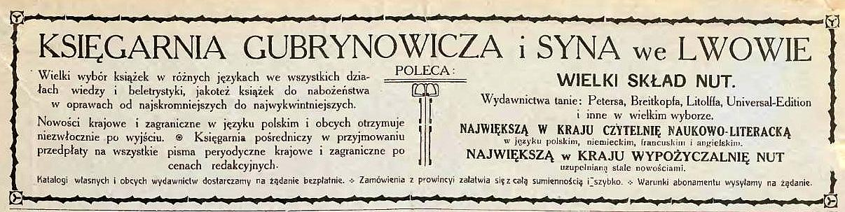 Ogłoszenie z 1914 we Lwowie. Księgarnia Gubrynowiczów.